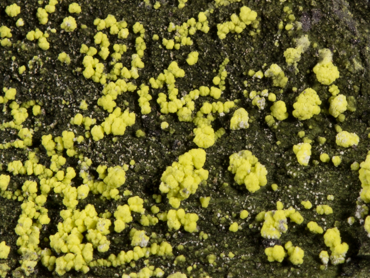 Čejkaïta trobada a la galeria C de la mina Eureka, a la localitat de Castell-estaó (La Torre de Cabdella, Pallars Jussà, Alt Pirineu, Catalunya). Mides: 3 x 1 x 1 cm. Data d'entrada a la col·lecció: 3 de maig de 2015